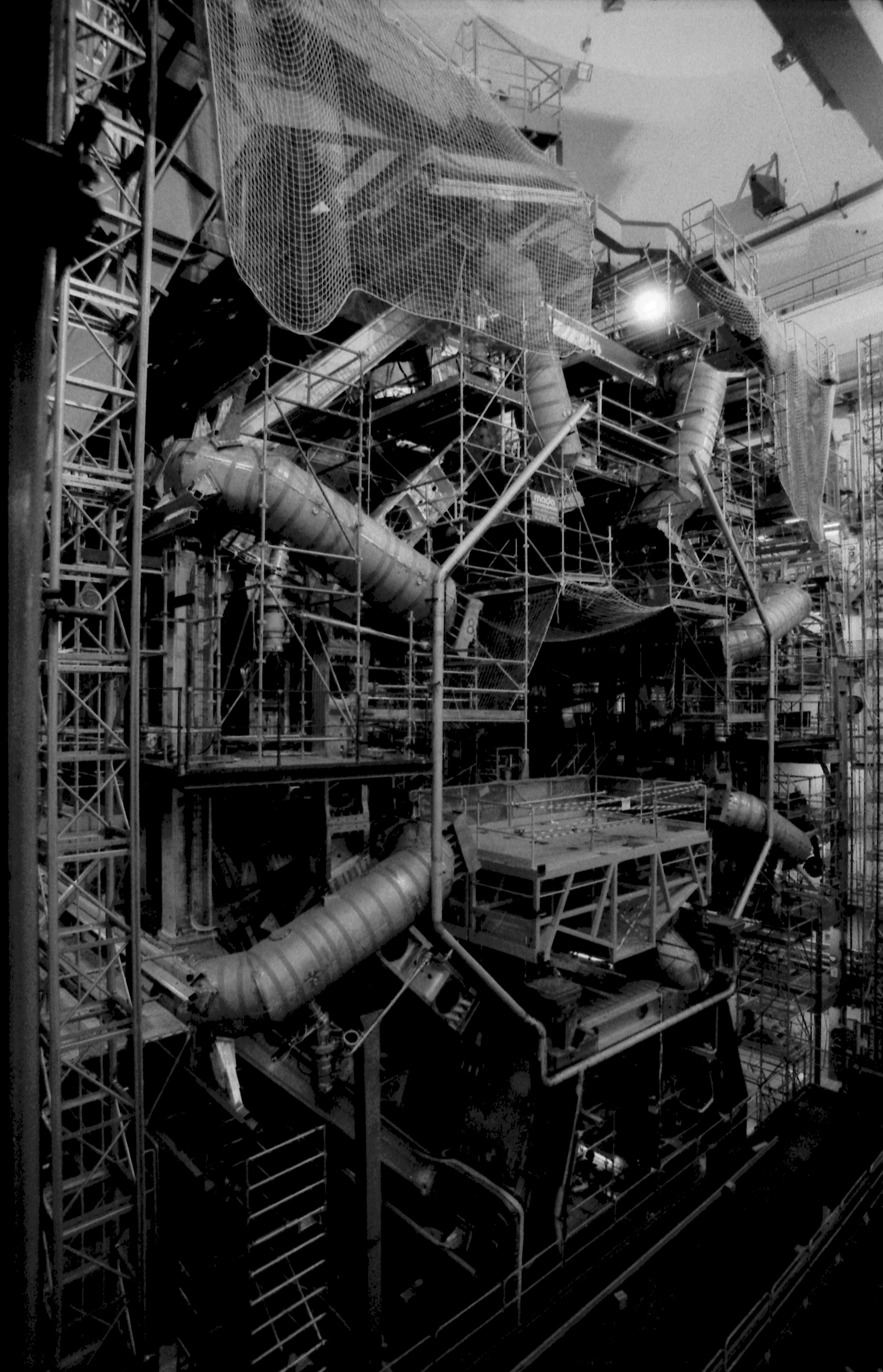 CERN: ATLAS et le Microcosme